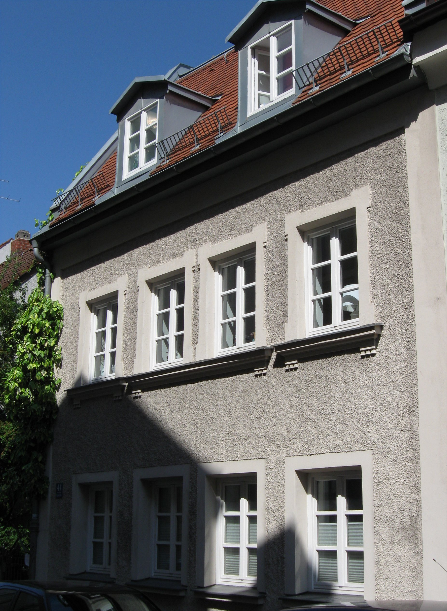 München, Aignerstraße 41; Zweigeschossiges Haus, mit klassizistischen Fensterrahmungen, erbaut 1897 mit Wiederverwendung von Teilen der Keller- und EG-Mauern des Vorgängerbaues.